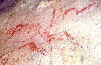 Arte parietal del Paleolítico superior. Cueva La Pasiega en el monte Castillo.